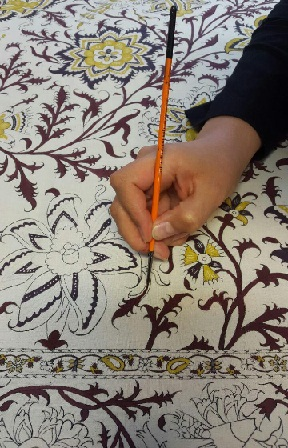 همانگونه که در واژه قلمکاری آمده است استفاده از ابزار "قلم" برای انتقال طرح و رنگ جزئی اساسی برای این هنر فاخر محسوب میشود